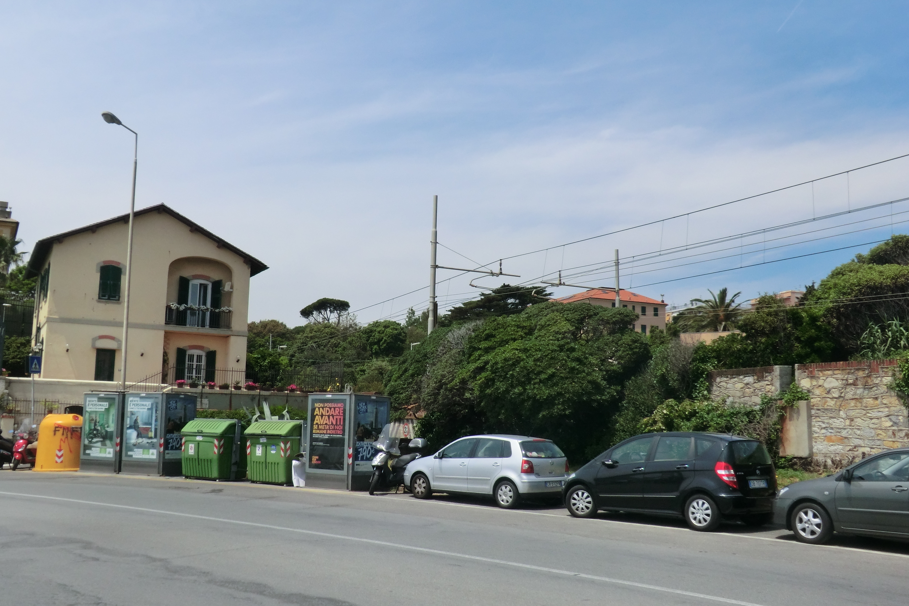 Genova, ex casello ferroviario nei pressi di Quinto al Mare